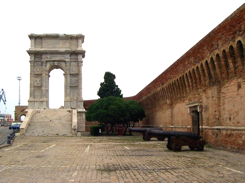 Ancona - Arco di Traiano